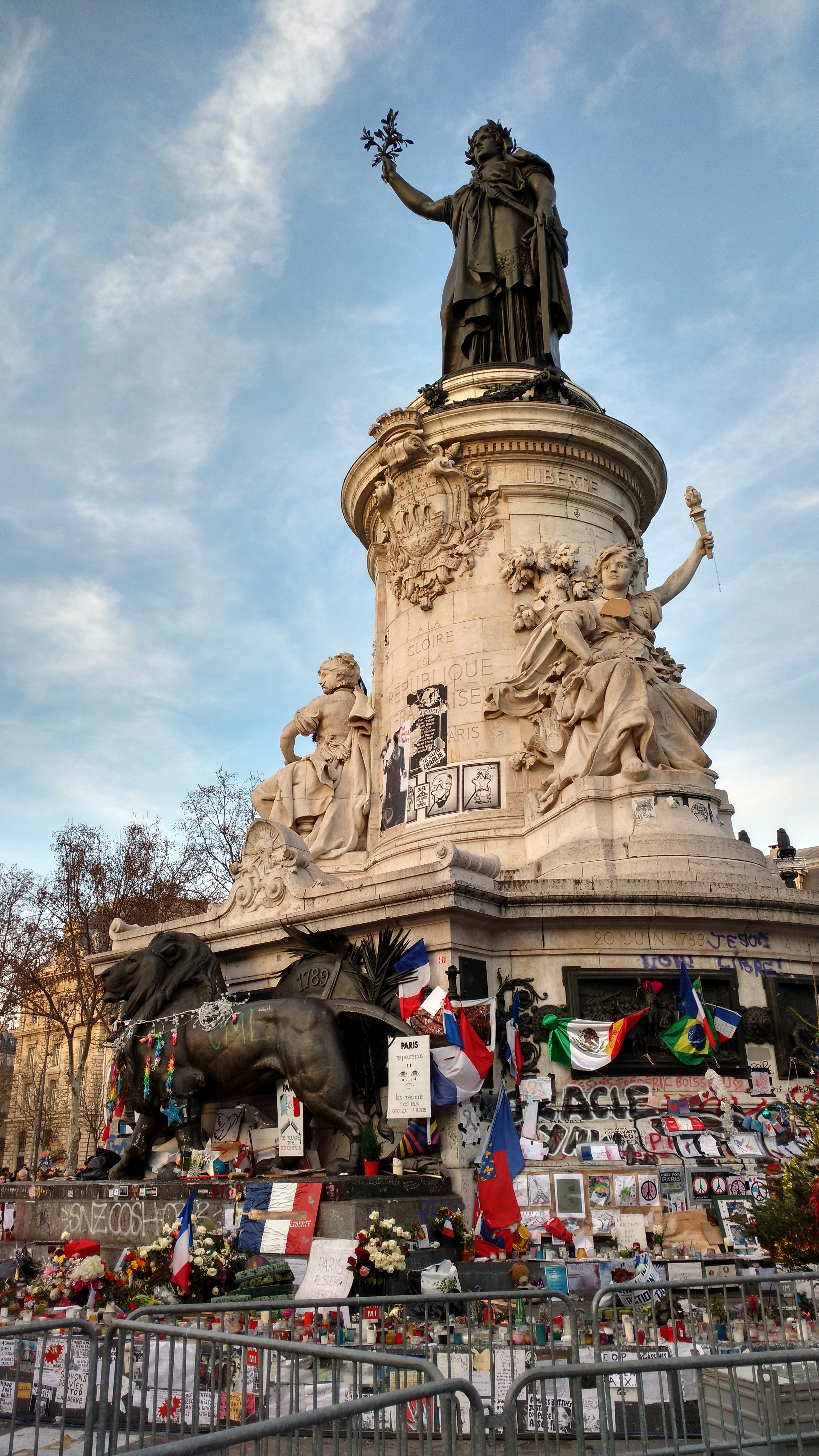 Côté sud du monument à la République où un mémorial improvisé a été mis en place pour les attentats en France en 2015